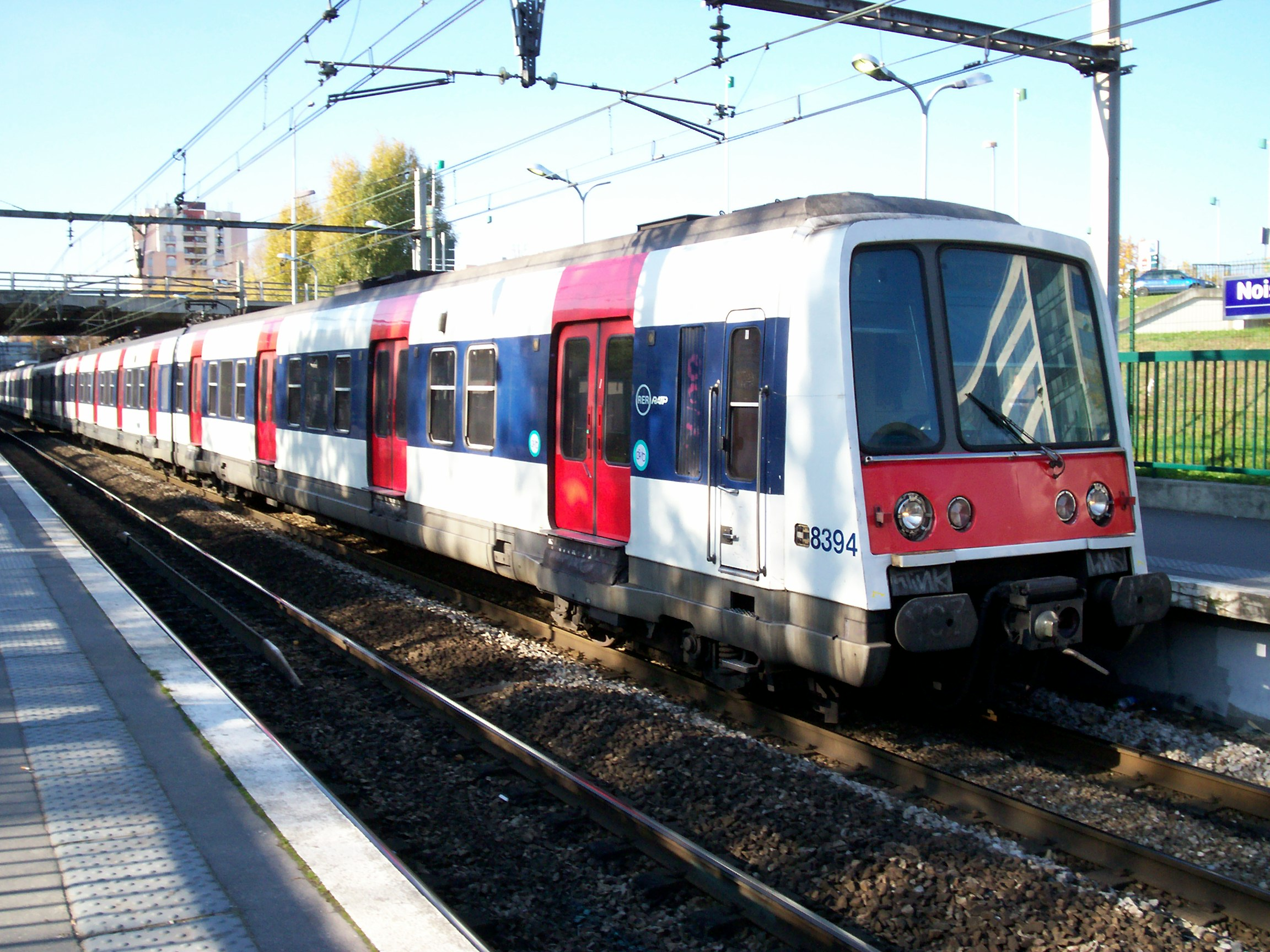 MI 84 - Gare de Noisy-Champs